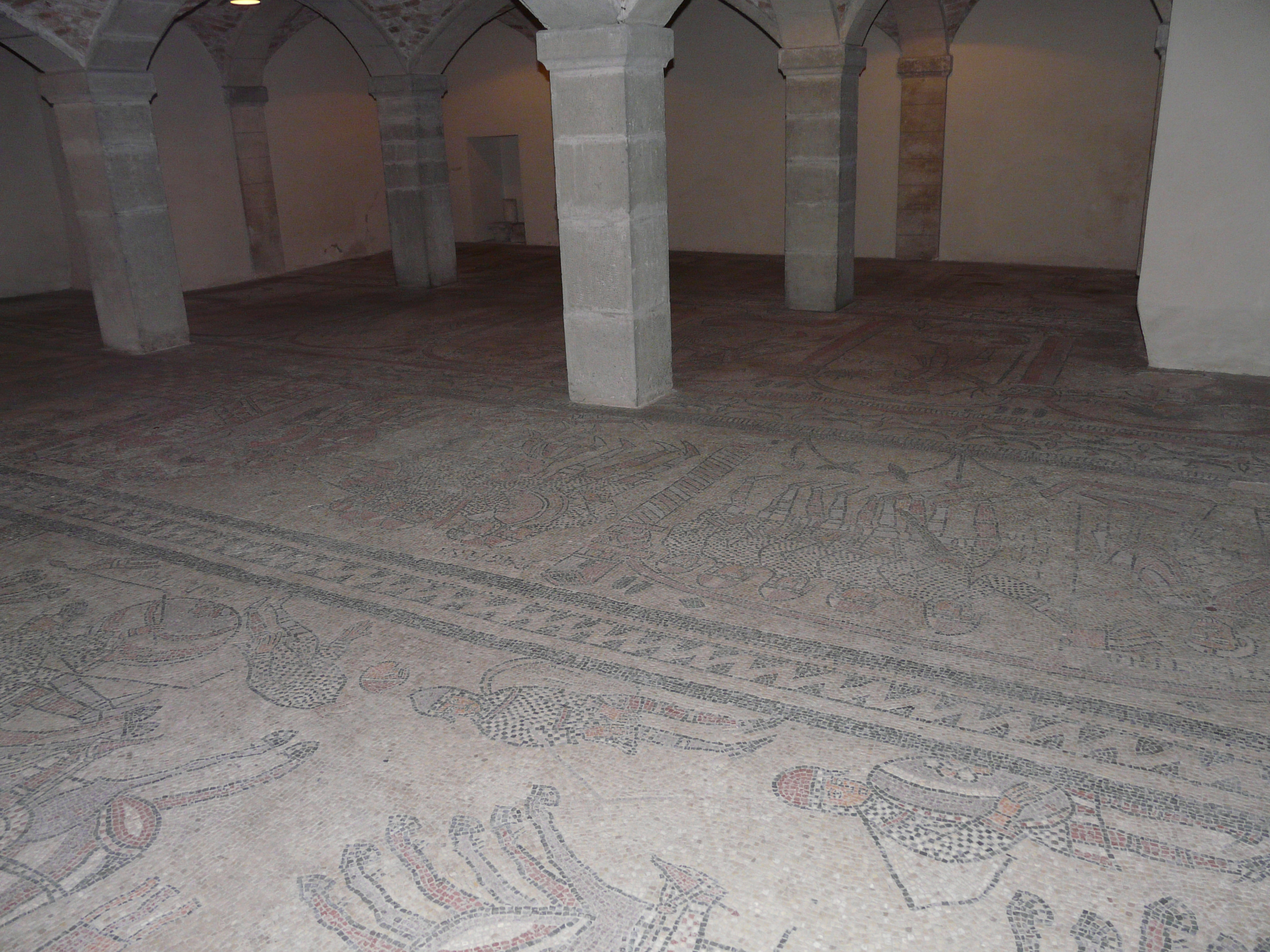 Immagini dell'abbazia di San Colombano di Bobbio, Emilia-Romagna, Italia